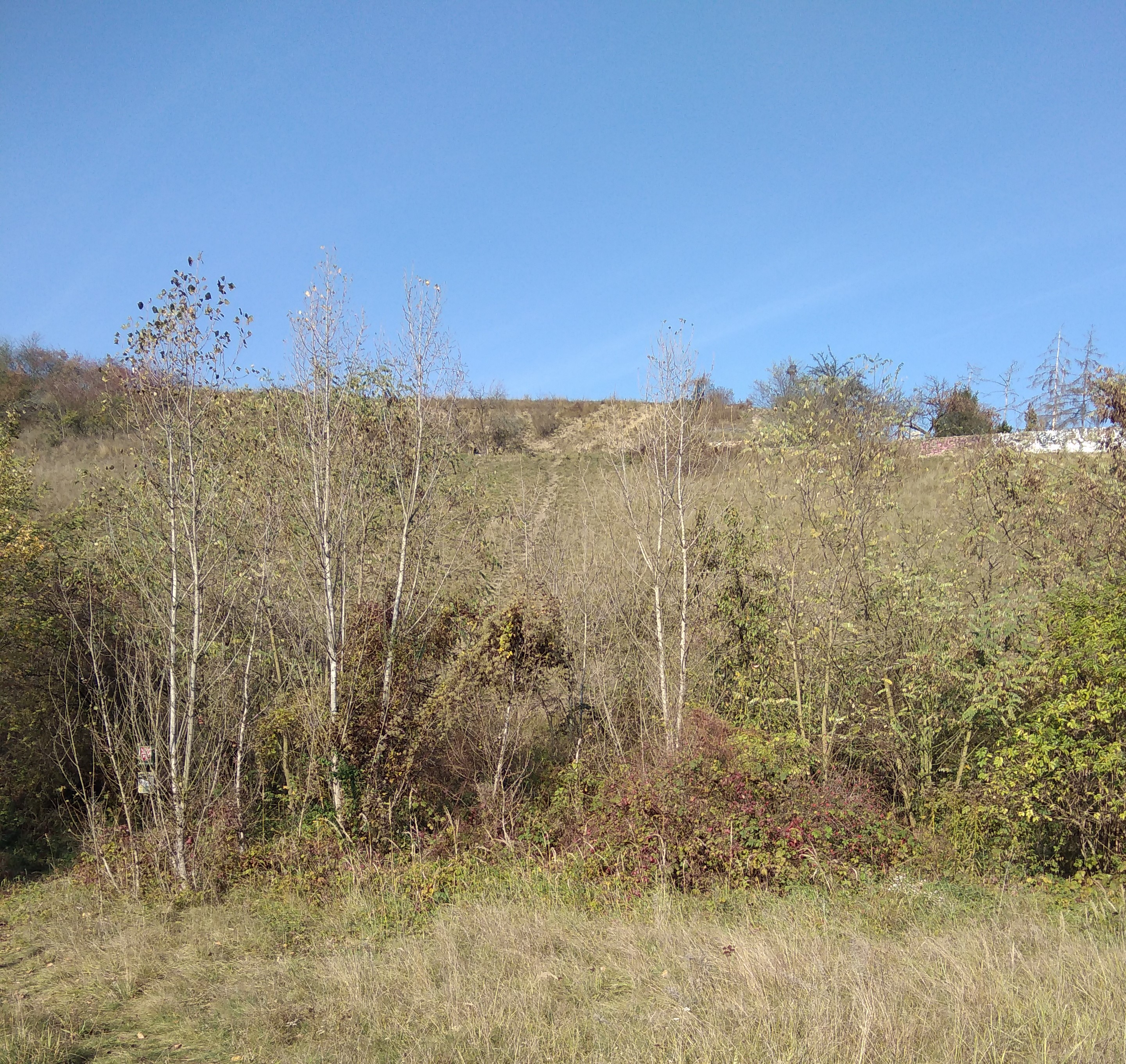 Pohled zezdola na východní část přírodní památky Trojská na Praze 8